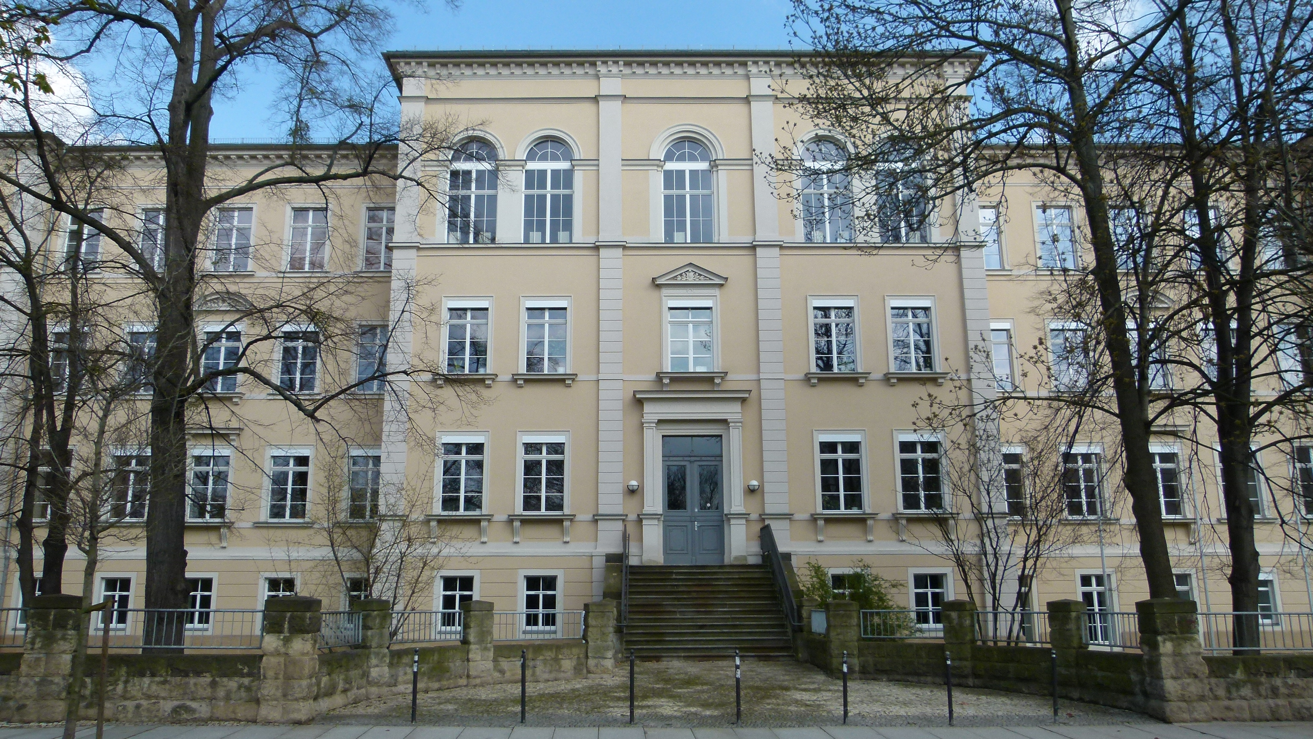 Schiller-Gymnasium, Denkmalgeschützter Häuserkomplex, Seminarstrasse 3, Pirna